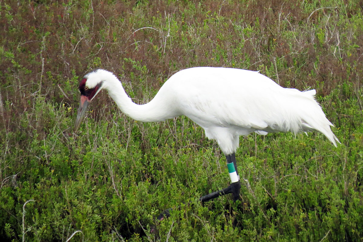 Grus americana 13 mar 16 Aransas NWR, Texas